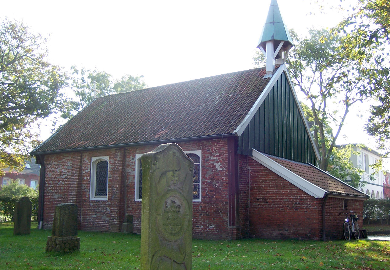 Nordseeinsel Spiekeroog. Alte Inselkirche von 1696 (ev.-luth.)